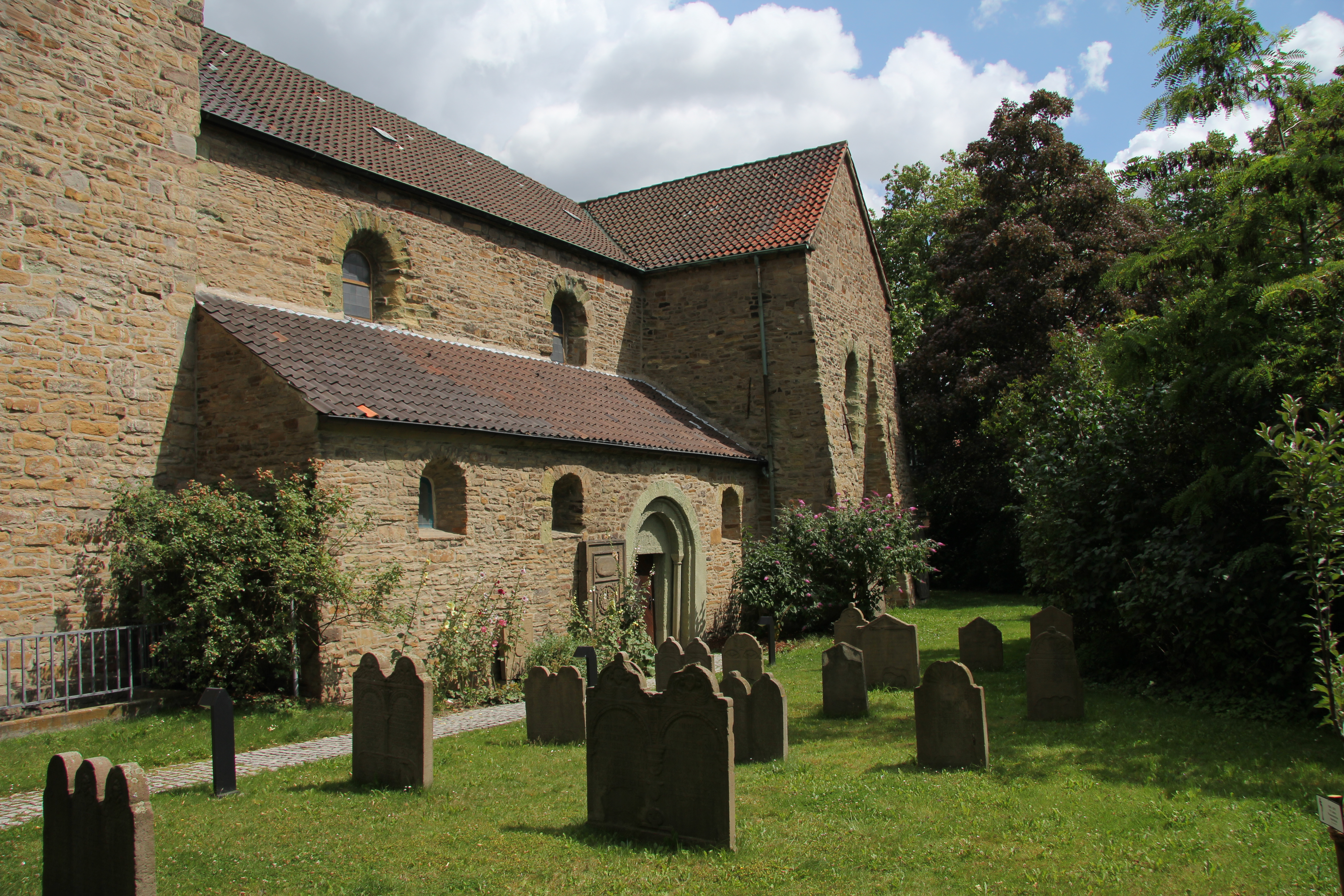 Teilansicht der Georgskirche in Dortmund-Aplerbeck